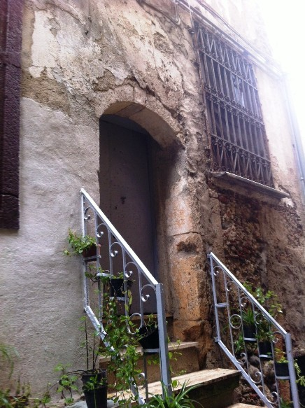 Luogo di nascita di Biagio Gioacchino Miraglia